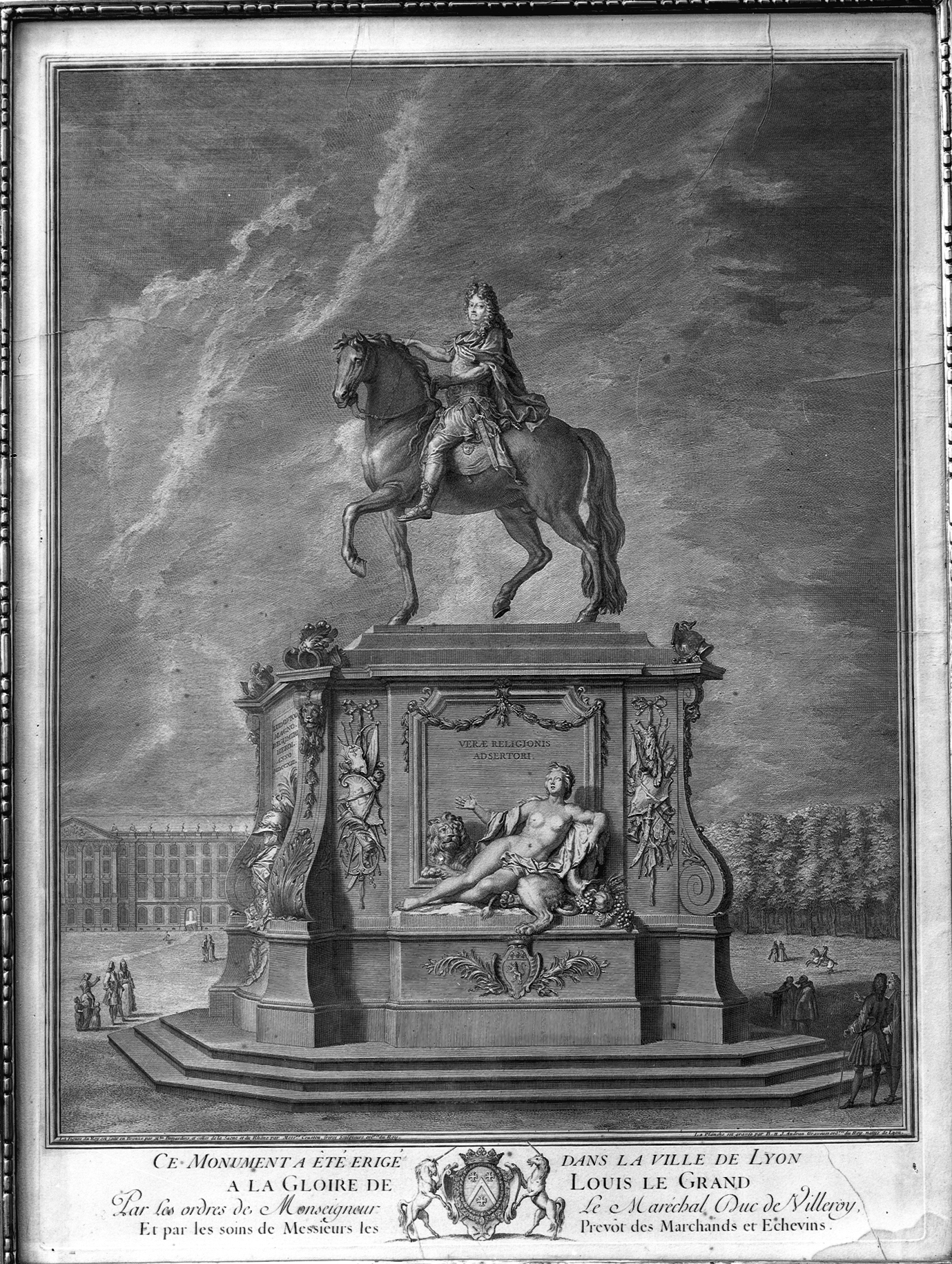 Estampe représentant la statut équestre de Louis XIV place Bellecour à Lyon (France) : Monument à la gloire de Louis le Grand - Graveur : Jean Audran 1667-1756. Sous l’image : « Ce monument a été érigé dans la ville de Lyon / à la gloire de Louis le Grand / Par les ordres de Monseigneur le Maréchal Duc de Villeroy / Et par les soins de Messieurs les Prévôt des Marchands et Echevins ».